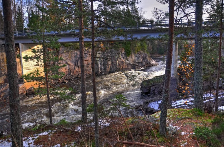 sundbyelva